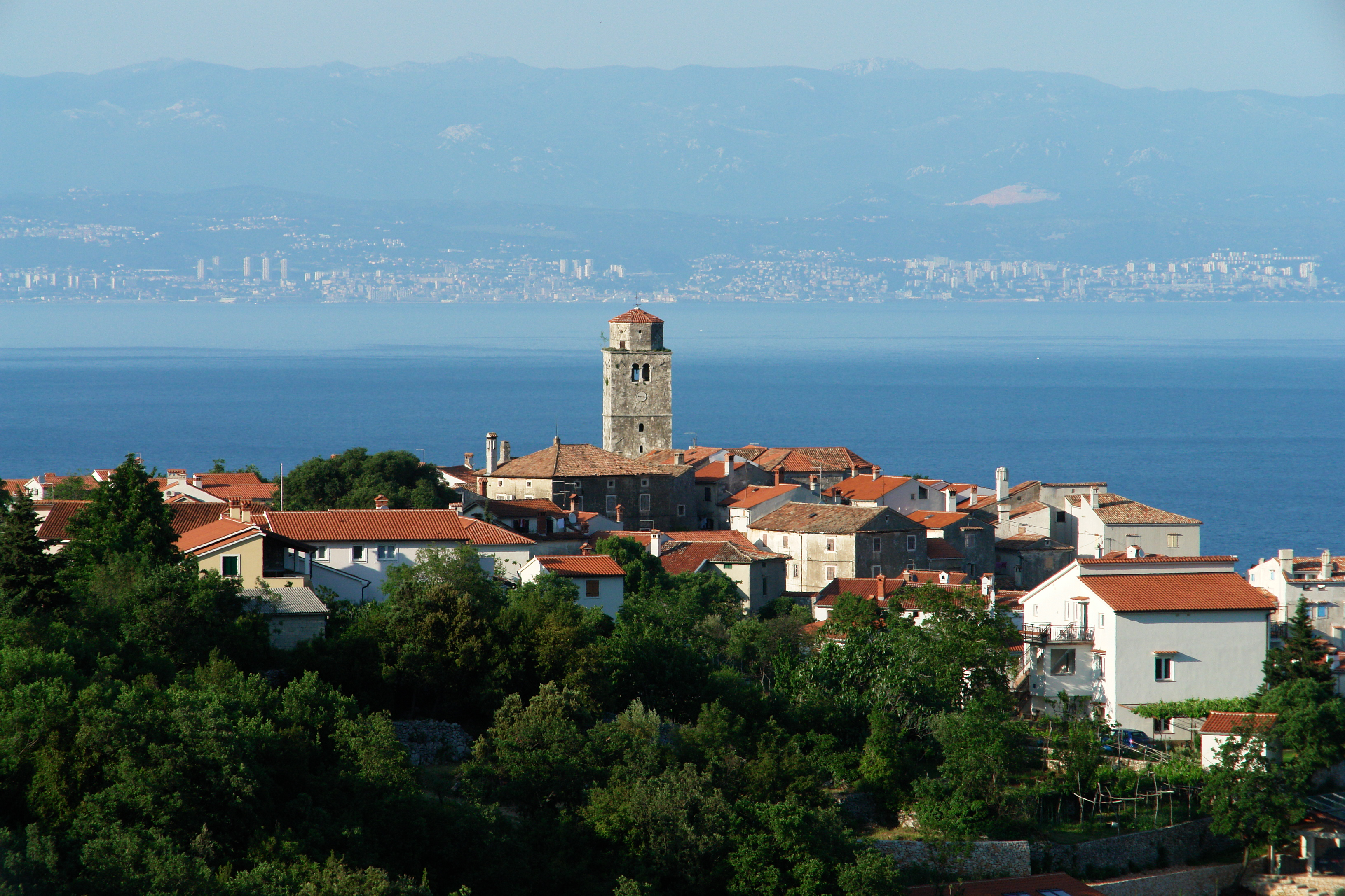 Mošćenice